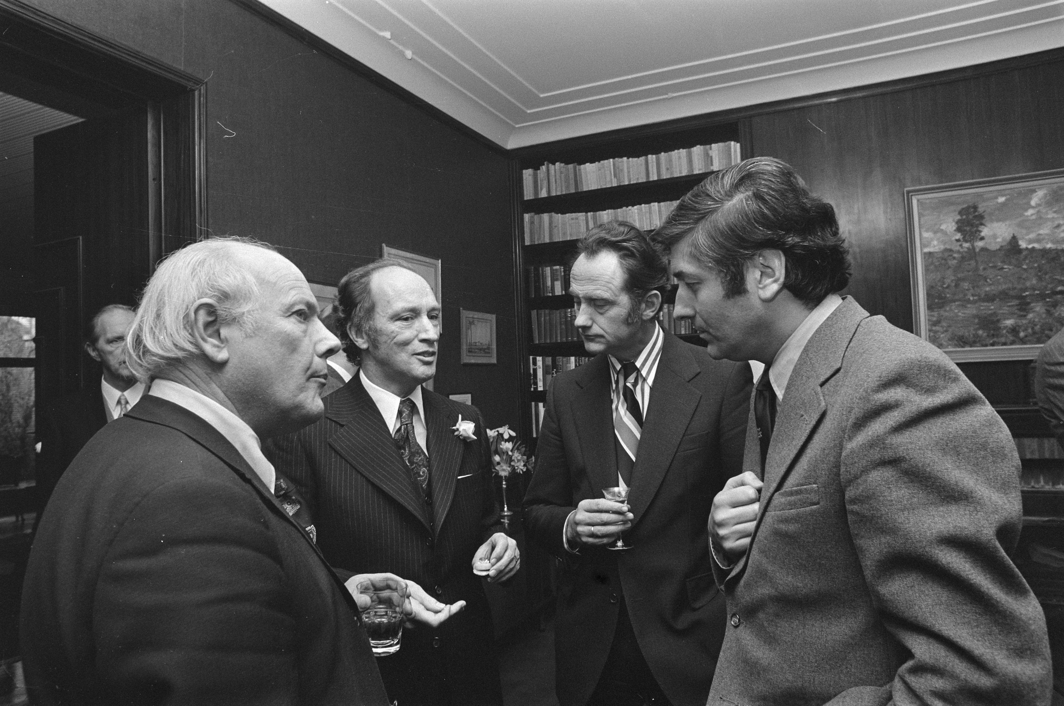 Collectie / Archief : Fotocollectie Anefo Reportage / Serie : [ onbekend ] Beschrijving : Canadese premier Trudeau biedt regering lunch aan in ambtswoning Canadese ambassadeur; Den Uyl , Trudeau, min. Boersma en min. Lubbers Datum : 28 februari 1975 Trefwoorden : ambtswoningen, lunches Persoonsnaam : Boersma, Jaap, Trudeau, Pierre, Uyl, Joop den Fotograaf : Mieremet, Rob / Anefo Auteursrechthebbende : Nationaal Archief Materiaalsoort : Negatief (zwart/wit) Nummer archiefinventaris : bekijk toegang 2.24.01.05 Bestanddeelnummer : 927-7832